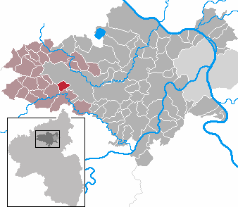 Reudelsterz in Rhineland-Palatinate - district Mayen-Koblenz